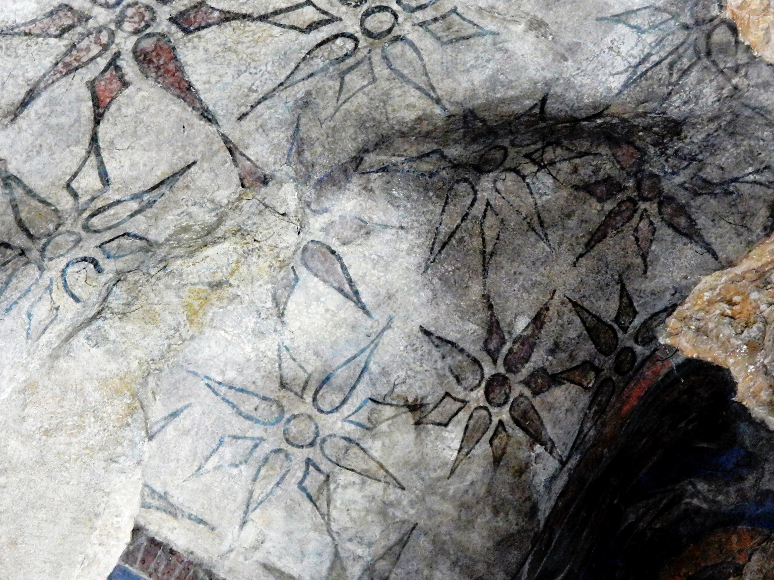 Jerozolima, Grota Pojmania Jezusa, Grota Getsemani